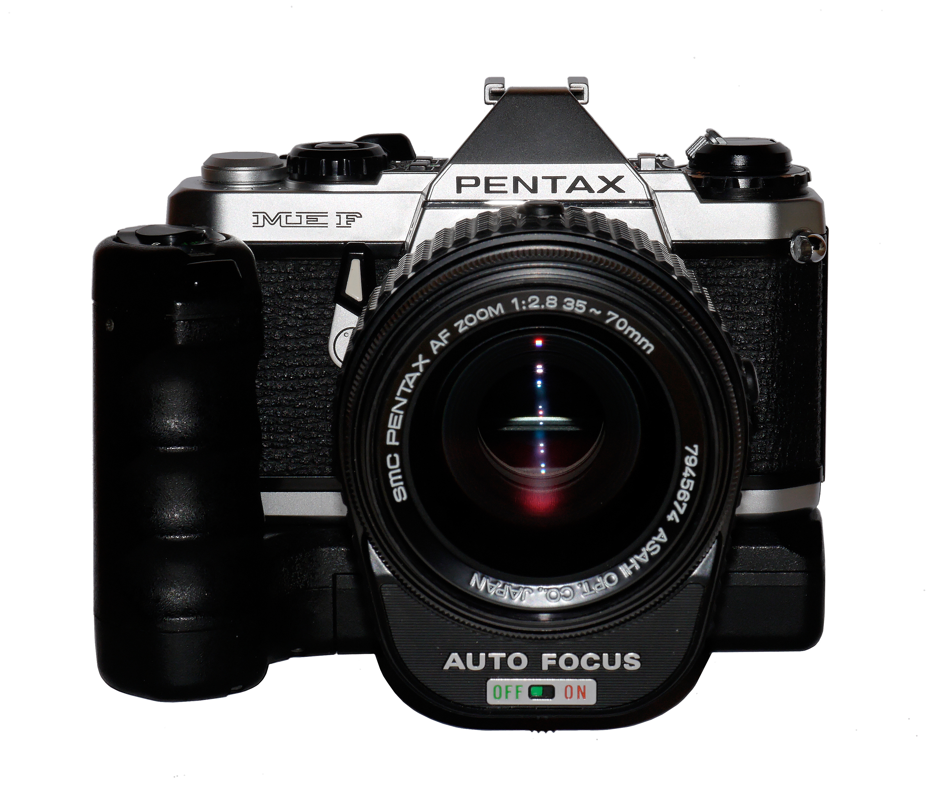 Pentax ME F mit AF 2.8/35-70mm Objektiv und Winder ME2